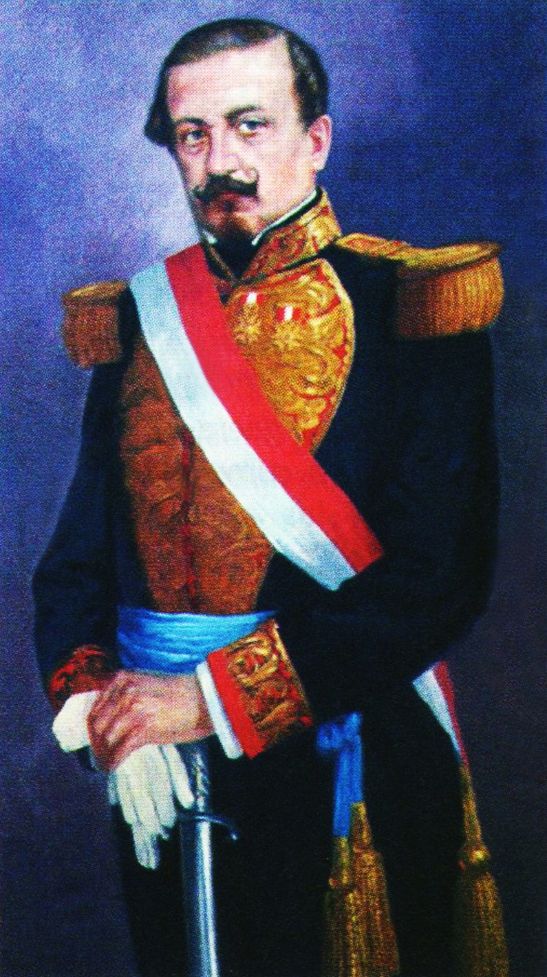 Manuel Ignacio Vivanco, presidente de la Republica del Perú (1843-1844)